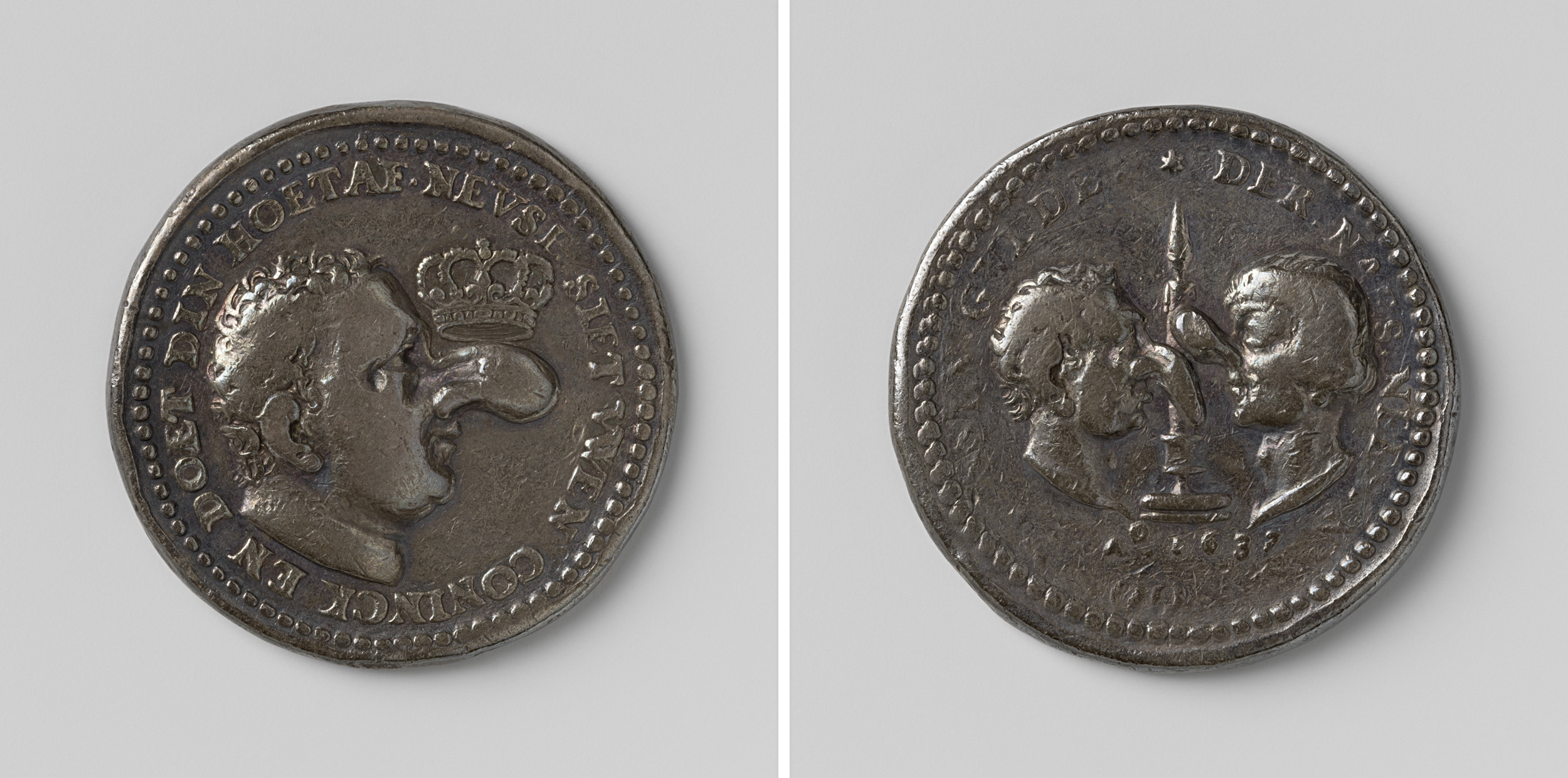 Opnamedatum: 2018-03-21; Voorzijde: portret van man met krullend haar en lange, dikke neus, bekroond met kroon binnen omschrift. Keerzijde: twee naar elkaar gewende portretten van mannen; links: man met krullend haar en lange, afhangende neus; rechts: man met stijl, gekamd haar en omhoog wijzende neus; op achtergrond een brandende kaars boven jaartal binnen omschrift